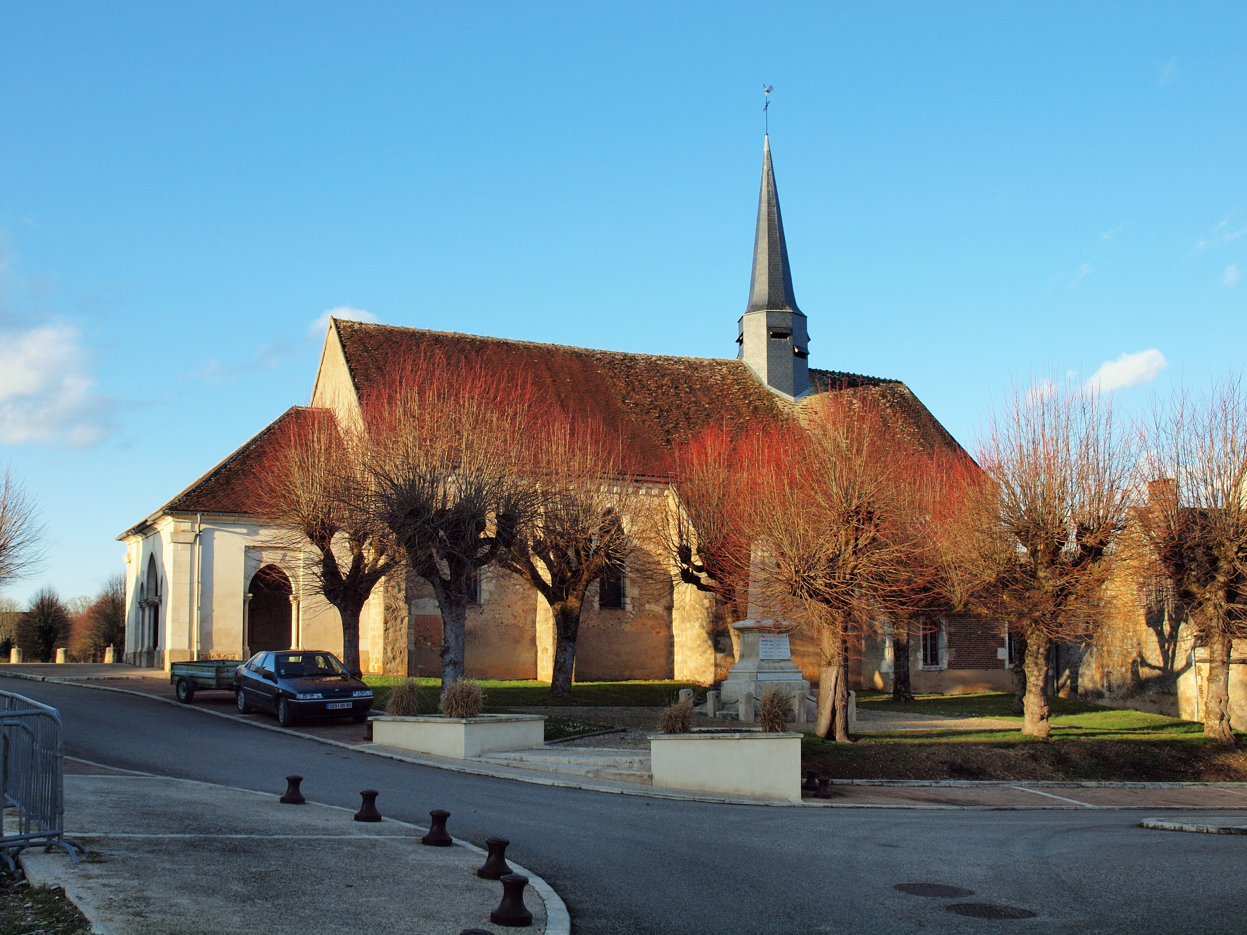 Looze (Yonne ; France)